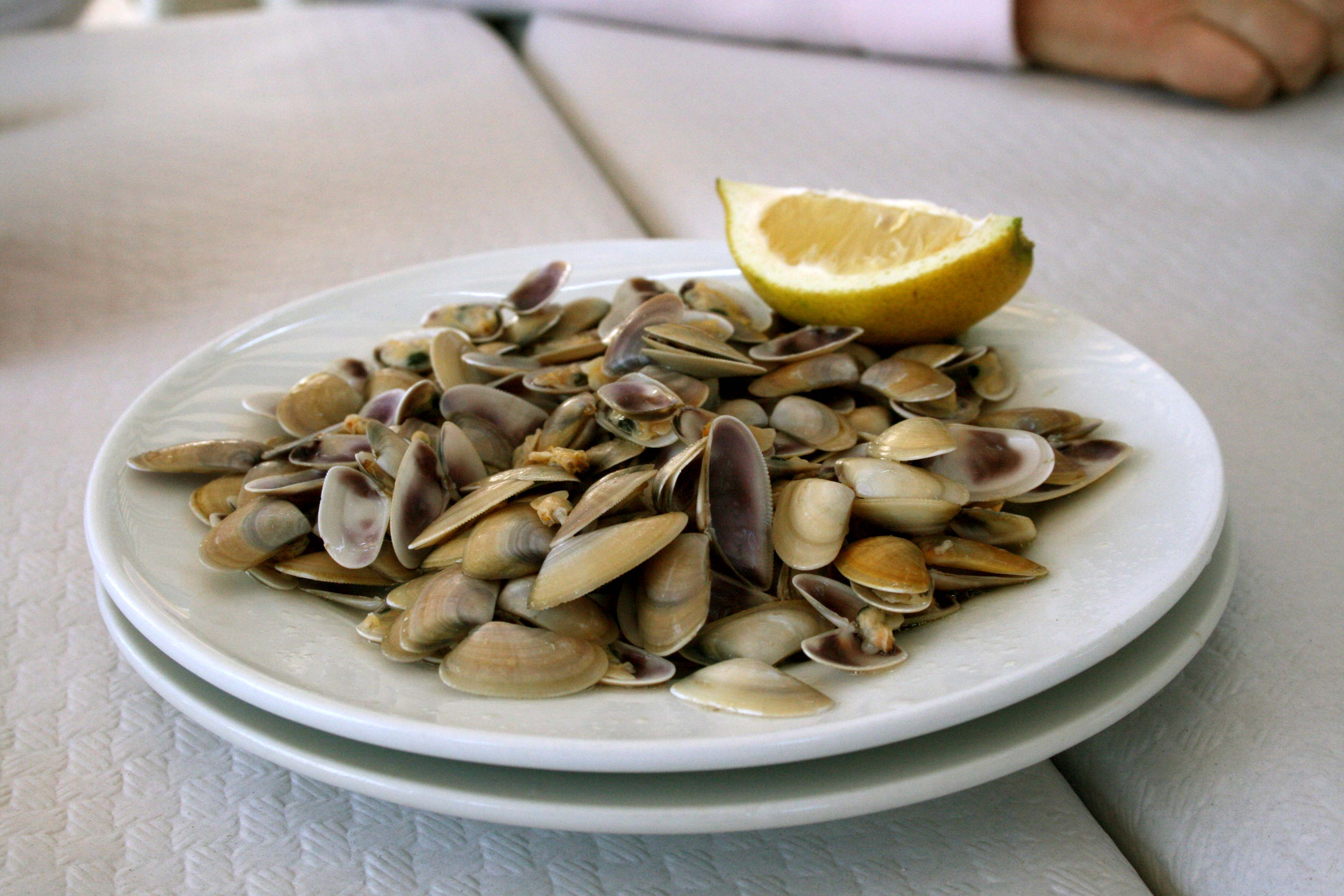 Coquinas - Tellinas